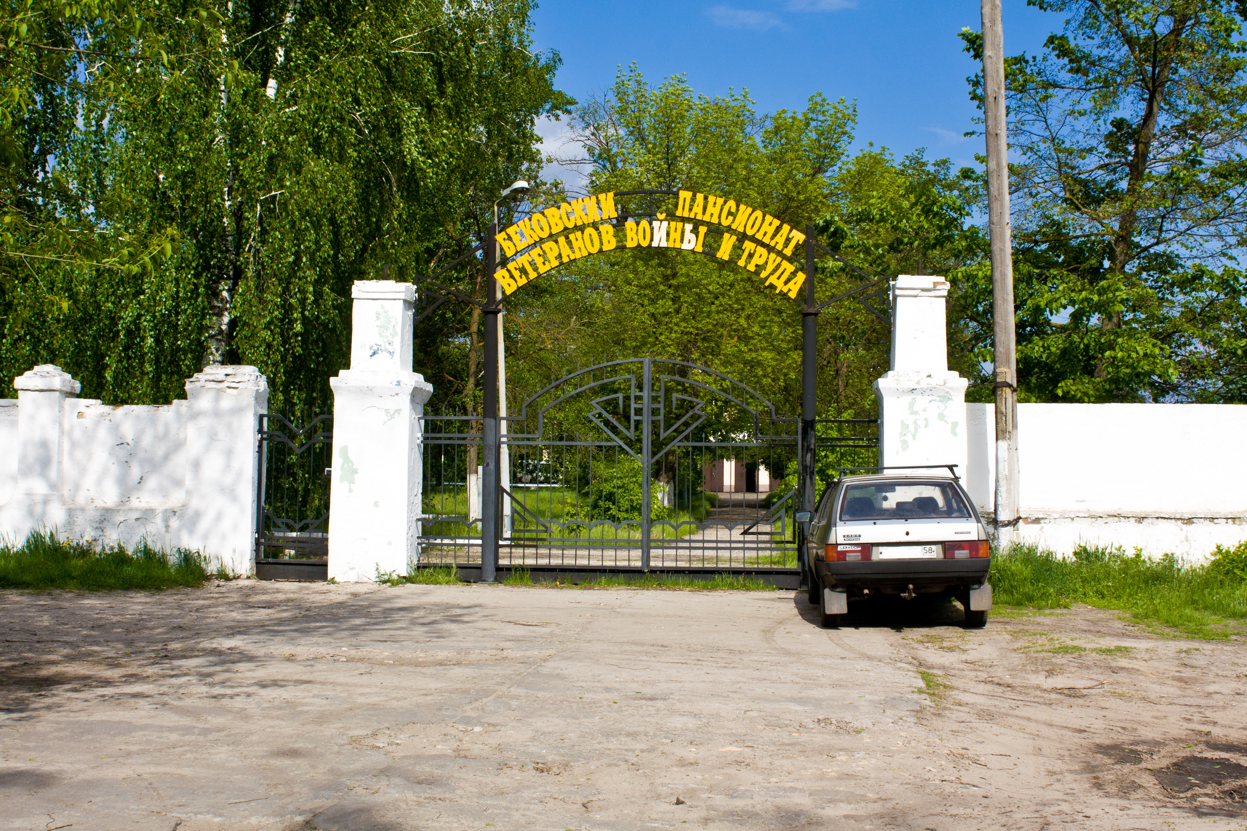 Вход в бывшую усадьбу Устиновых, Беково, 2020 год.